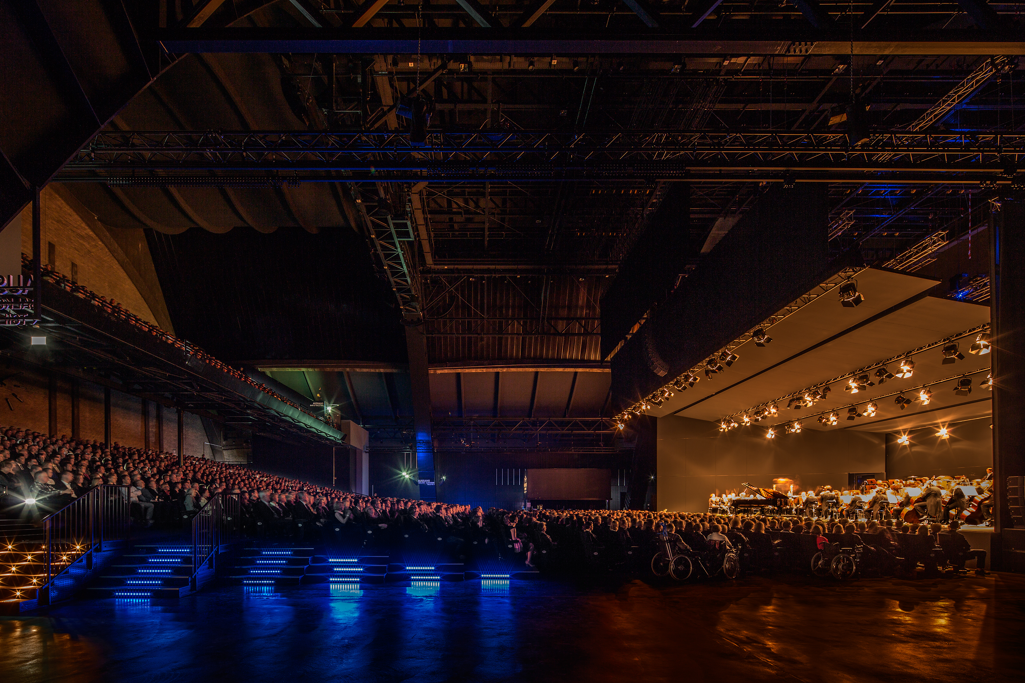 Mehr! Theater am Großmarkt Hamburg am Eröffnungsabend